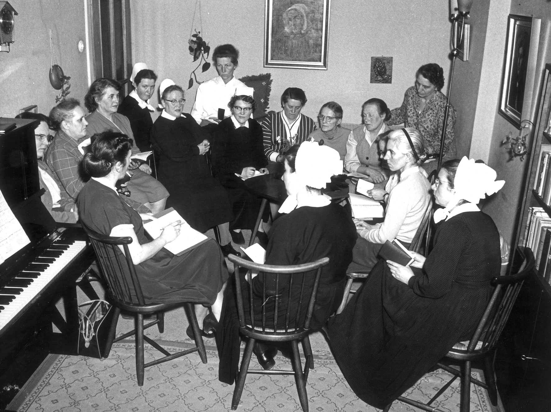 Hauskreis, Frau Berg, afw ( actionsring frau und welt ) Düsseldorf, Fotosammlung: Hans Lachmann Kasten 5/93-10,Bestand: AEKR Düsseldorf 8SL 046 (Bildarchiv), 027_00006